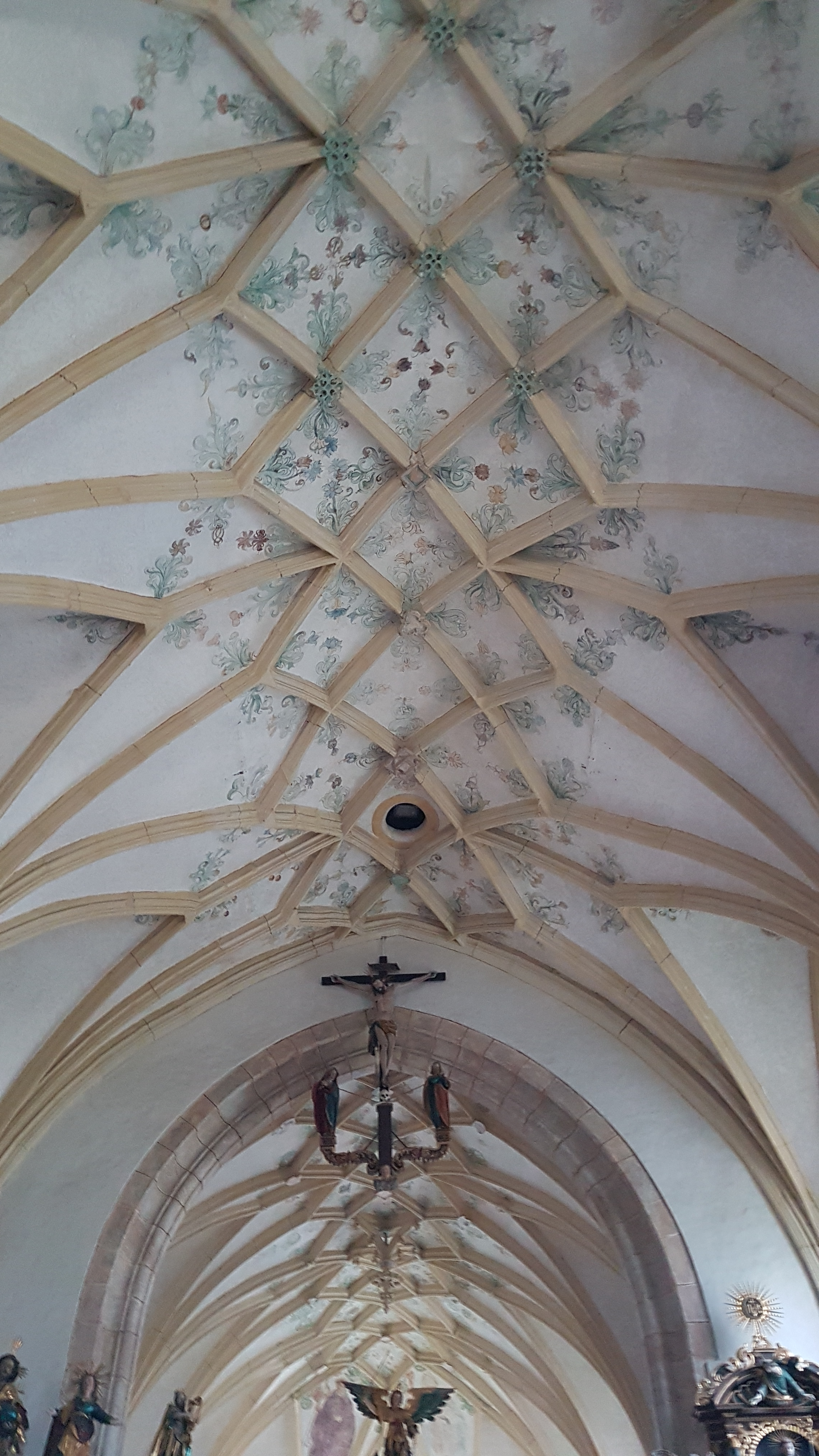 Filialkirche St. Leonhard bei Kundl